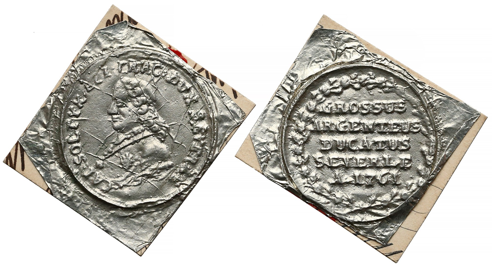 Dukat siewierski 1761 - prototypy wyciskowe (Bartynowski)